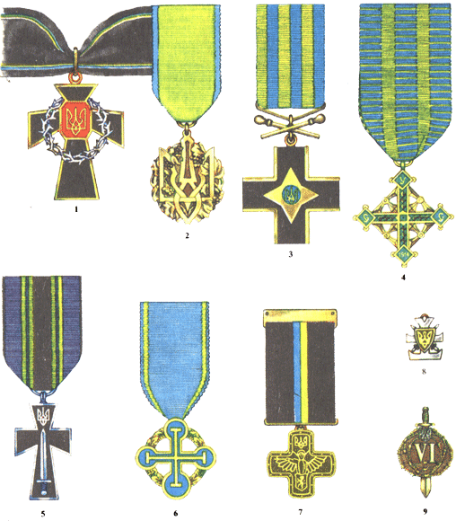 Ордени УНР, ЗУНР, УСС, УГА